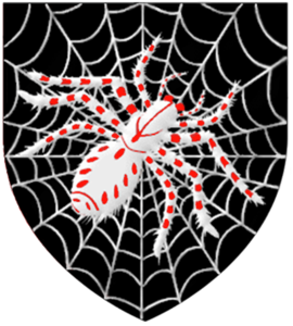 Casa Webber